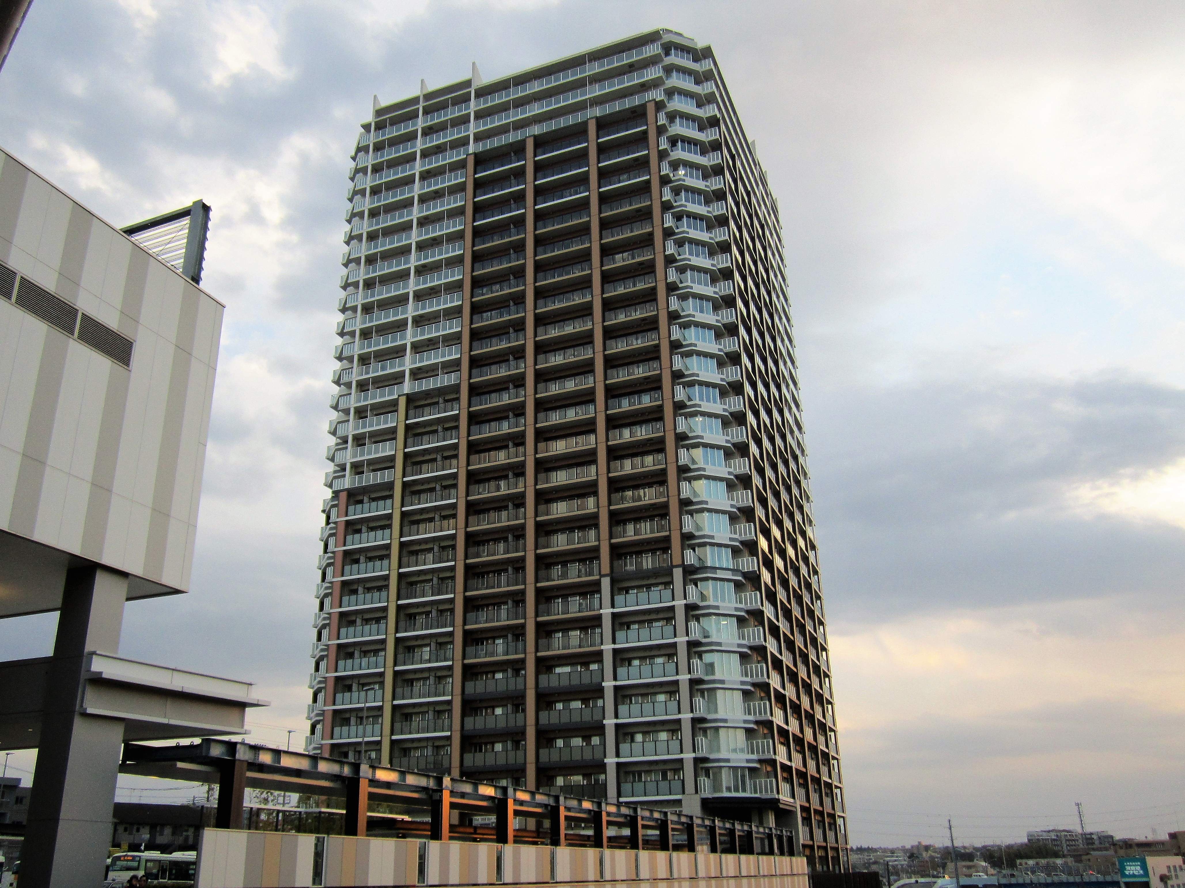 グレーシアタワー二俣川 Canon PowerShot A2200